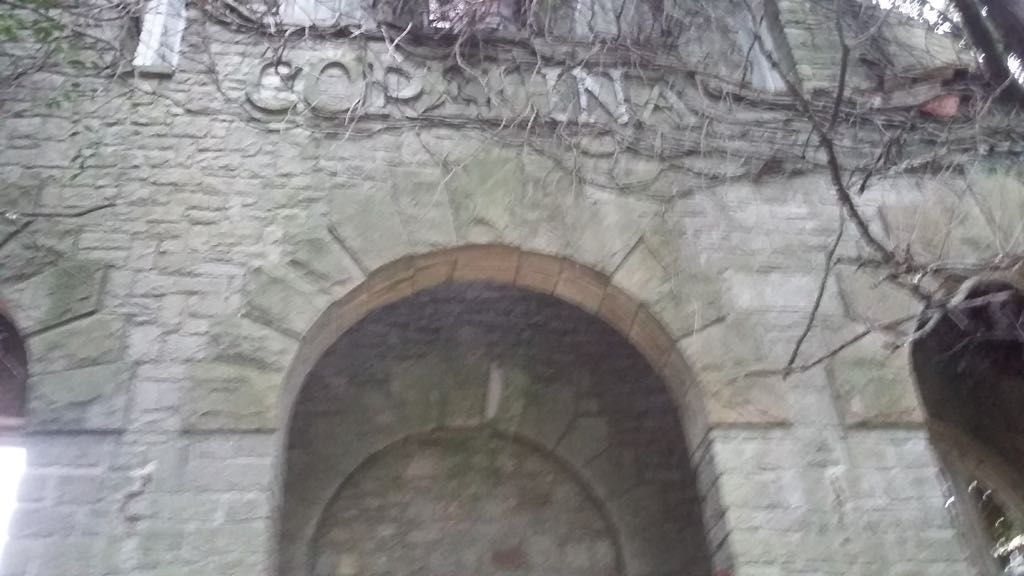 Puerta de entrada